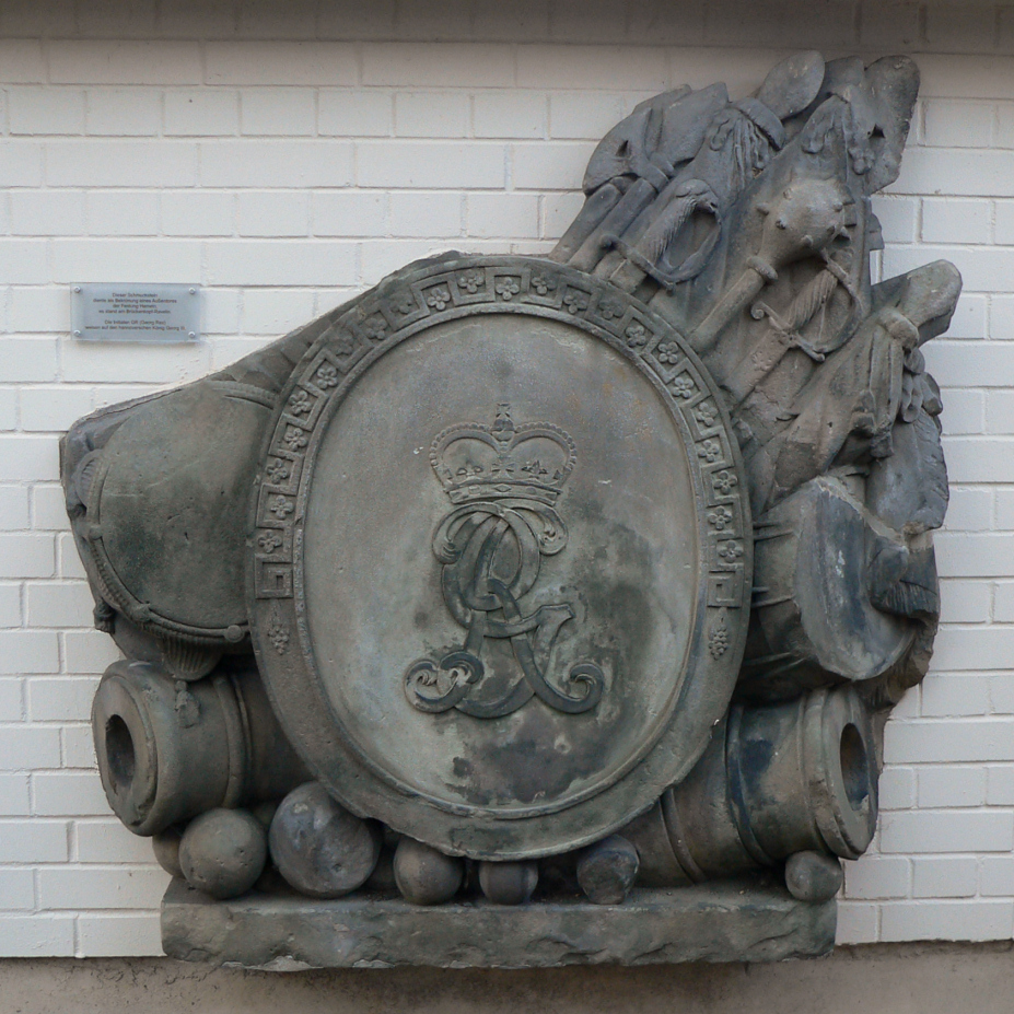 Schmuckstein mit den Initialen G R für den hannoverschen Königs Georg III., angefertigt als Torbekrönung eines Außentores der Festung Hameln am Brückenkopf-Ravelin (der Stadt gegenüberliegendes Weser-Ufer), heute aufgestellt im Museum Hameln